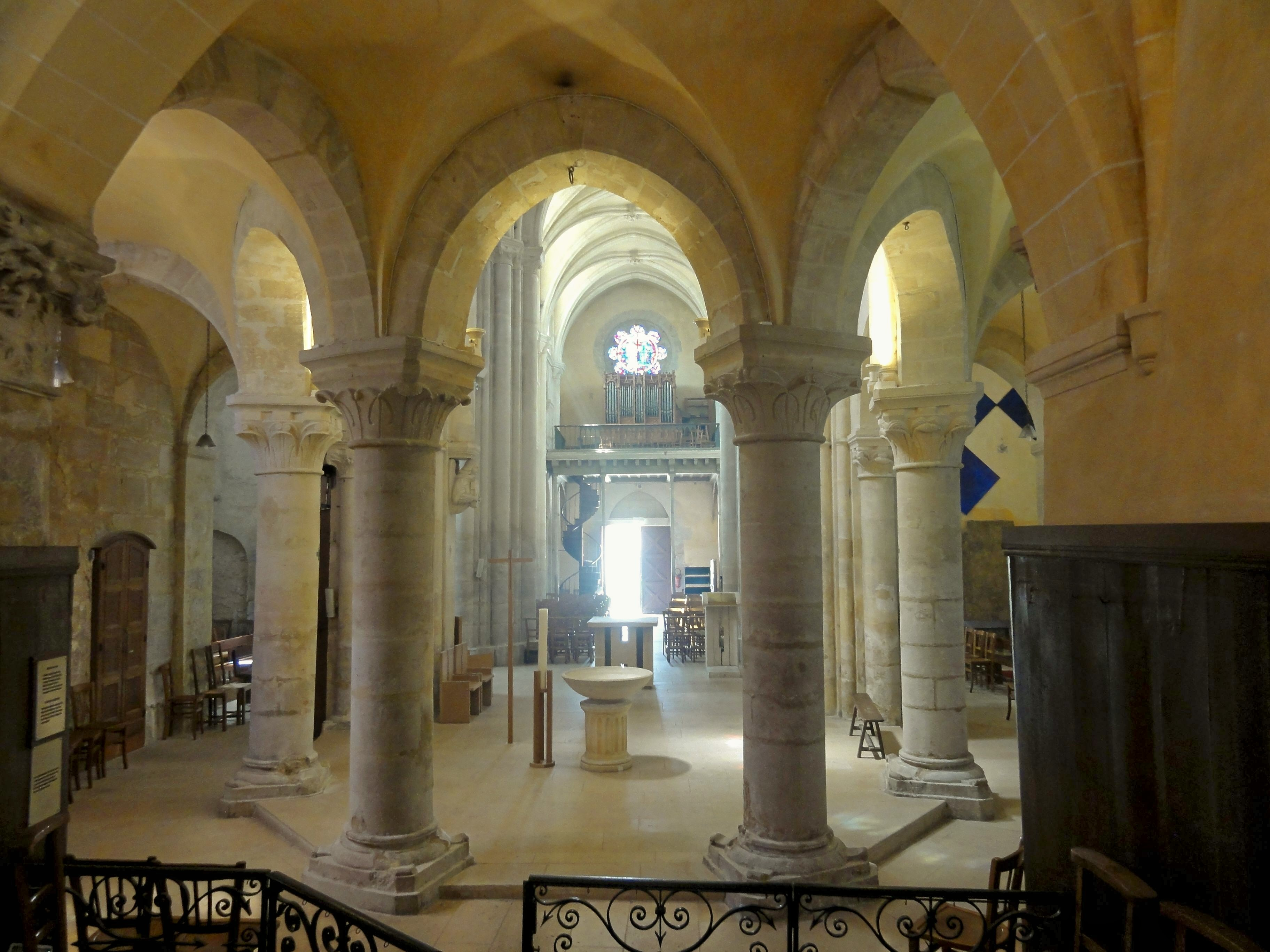 Déambulatoire.